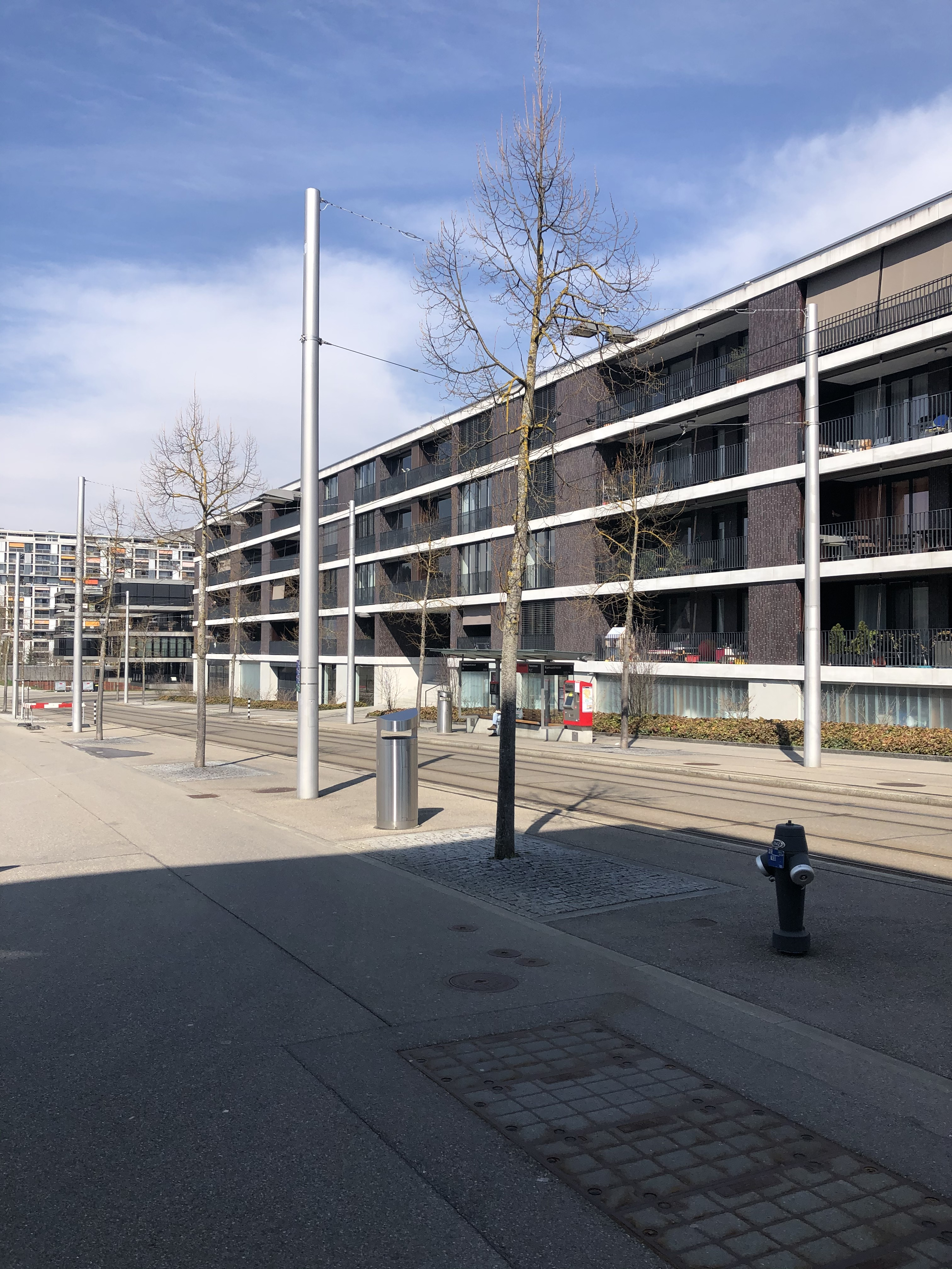 Wohnbenbauung in Bern-Brünnen